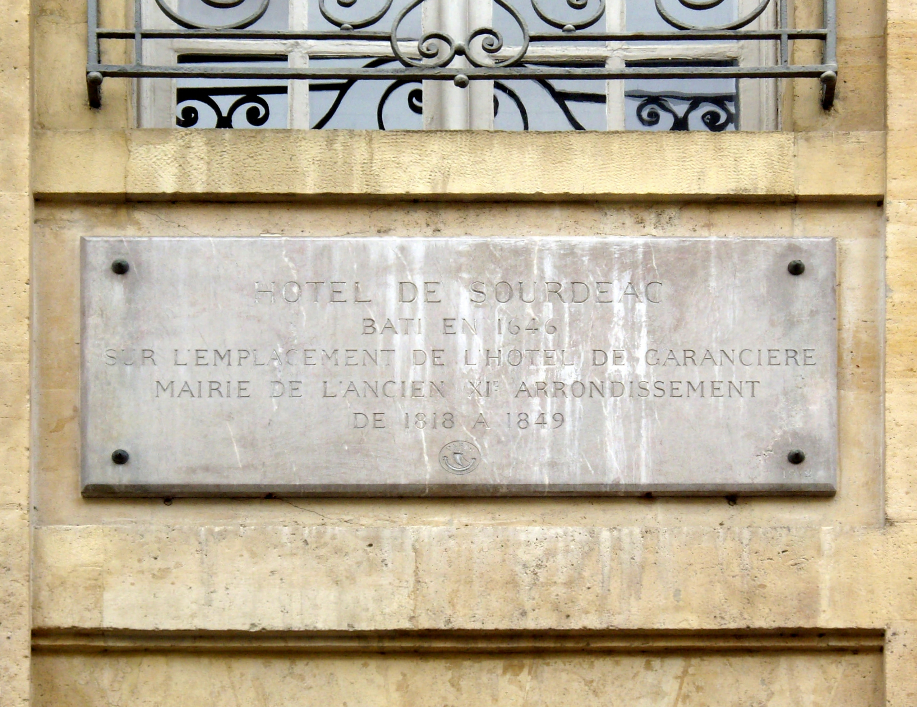 Plaque apposée sur la façade de l'hôtel de Sourdéac, au n° 8 de la rue Garancière, Paris 6e.« Hôtel de Sourdéac bâti en 1646 sur l'emplacement de l'hôtel de Garancière. Mairie de l'ancien XIe arrondissement de 1818 à 1849. »